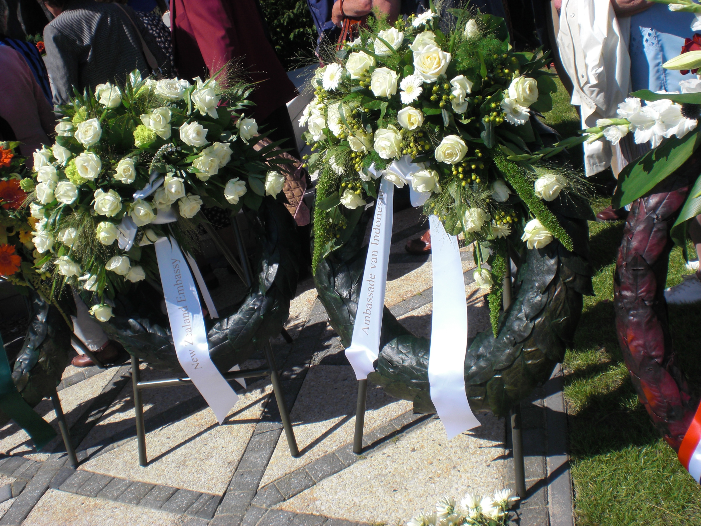 Bloemenkrans van Ambassade van Indonesië bij het Indische Monument te Den Haag op 15 augustus 2008